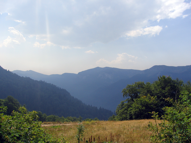 Nacionalni park Biogradska gora